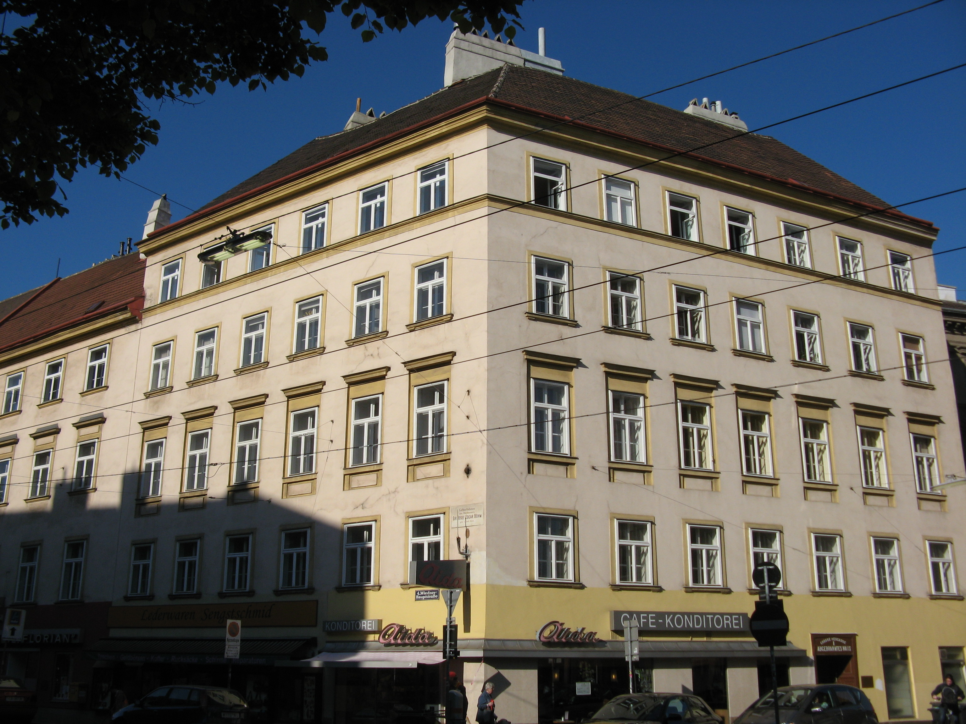 Haus (1. Hälfte 19. Jh.), Wiedner Hauptstraße 60, Wien-Wieden